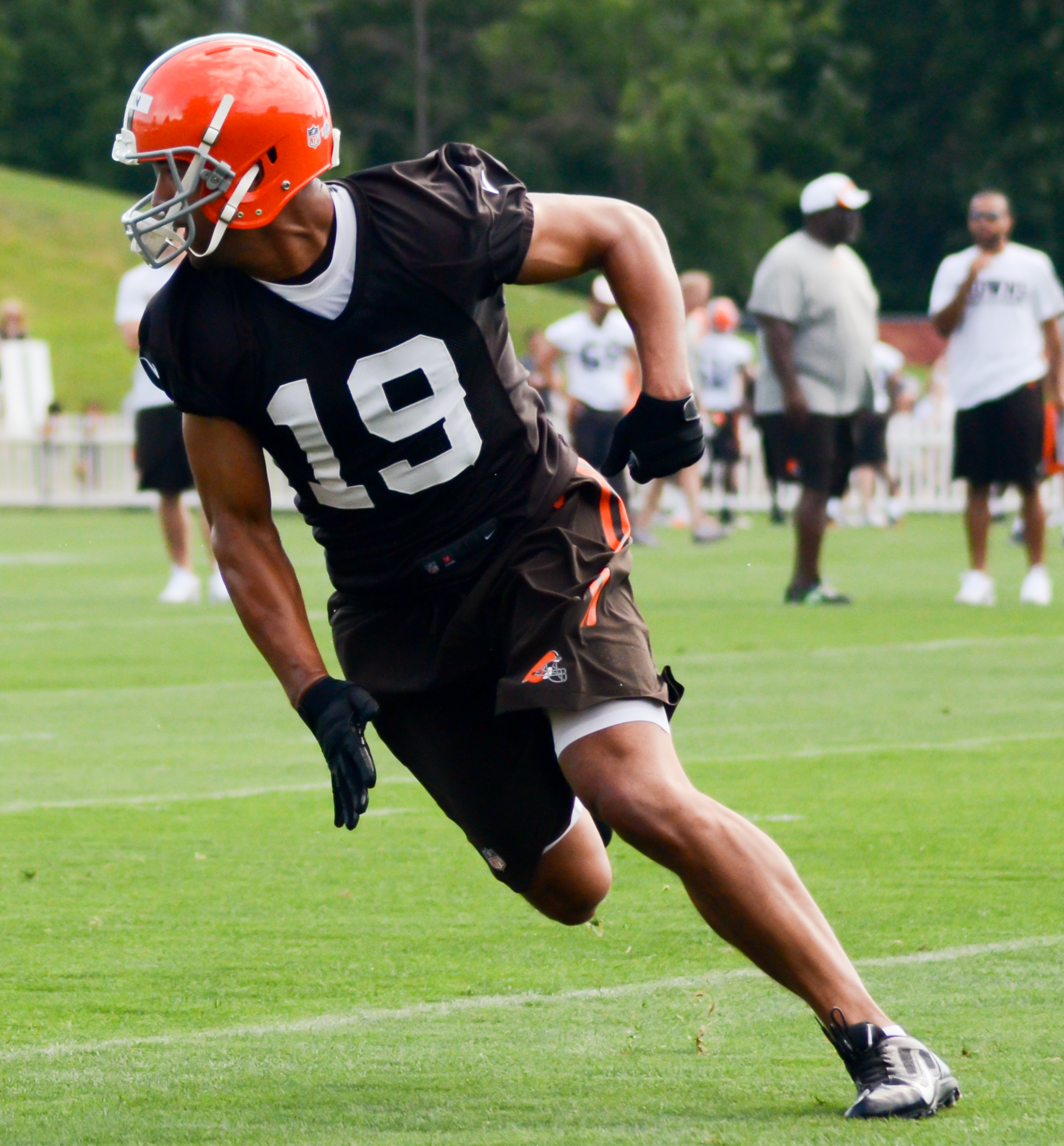 Miles Austin 2014 at Browns training camp.